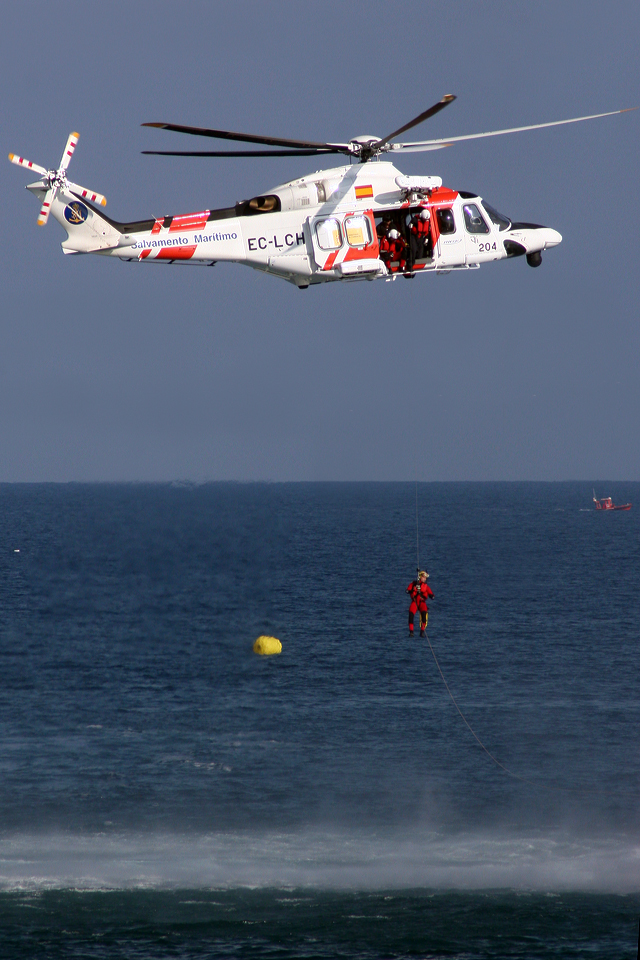 AgustaWestland AW139 Salvamento Marítimo EC-LCH